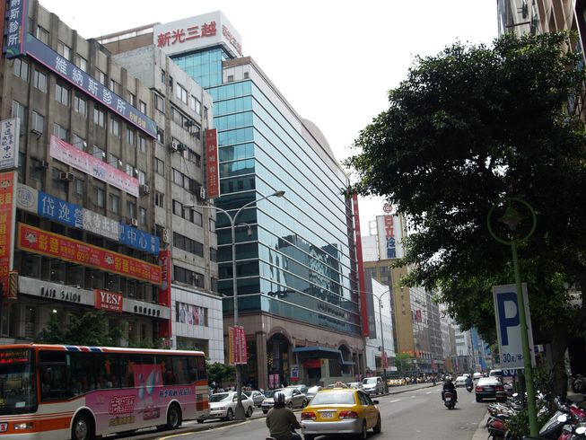 中文（台灣）: 臺北市中山區南京西路，新光三越百貨台北南西店前。